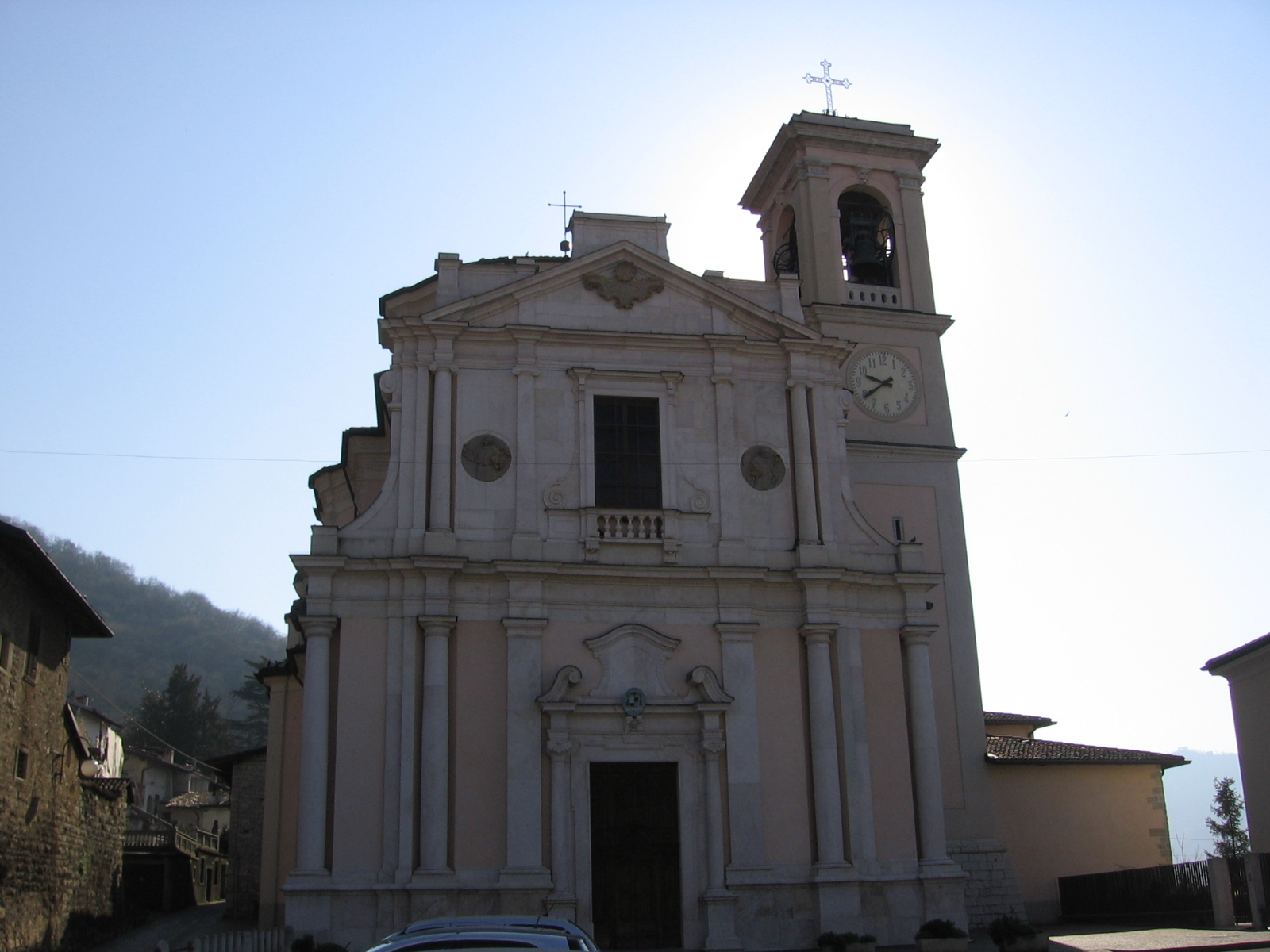 Zandobbio, Bergamo, Italia